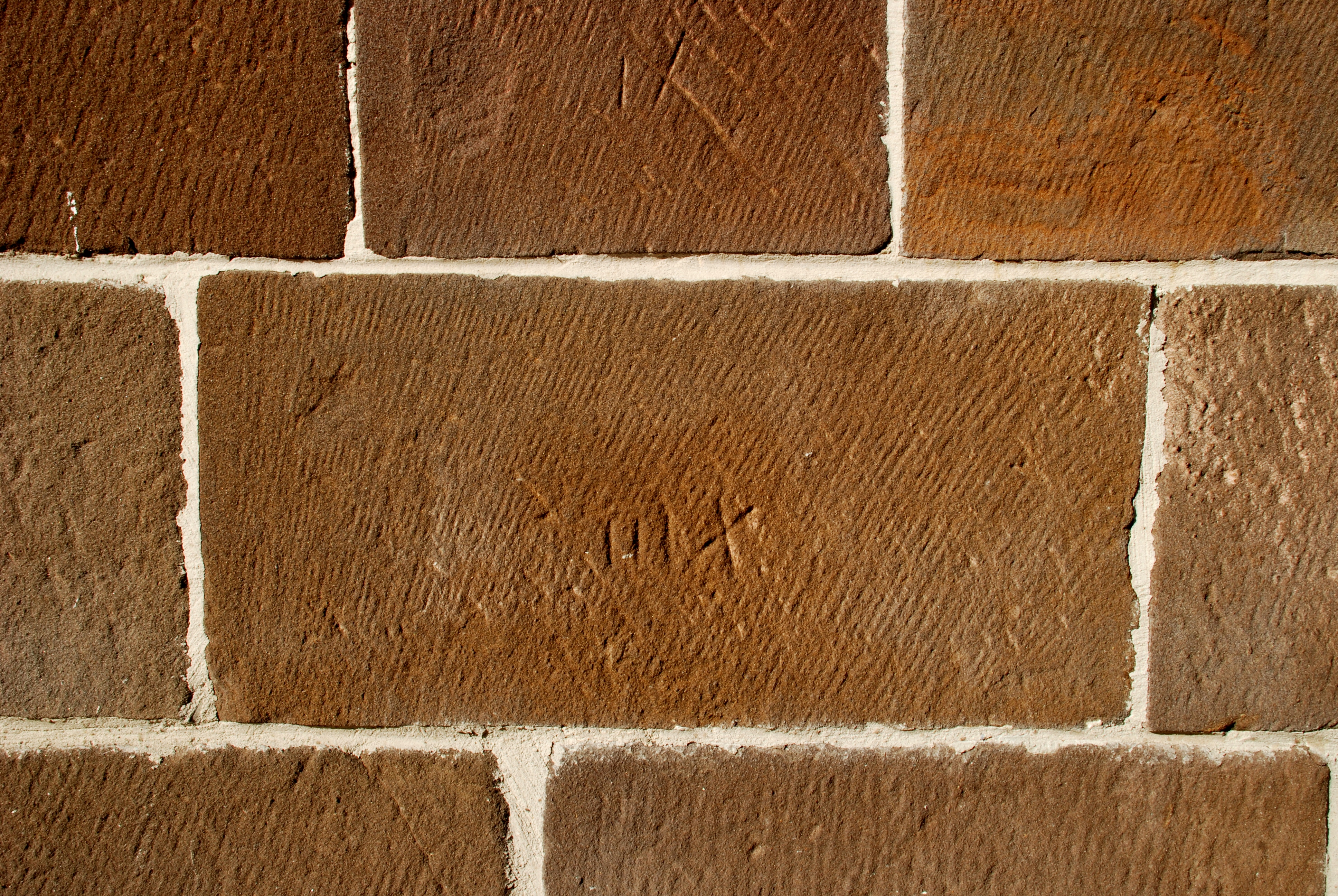 Belgique - Brabant wallon - Ottignies - Église Saint-Rémi